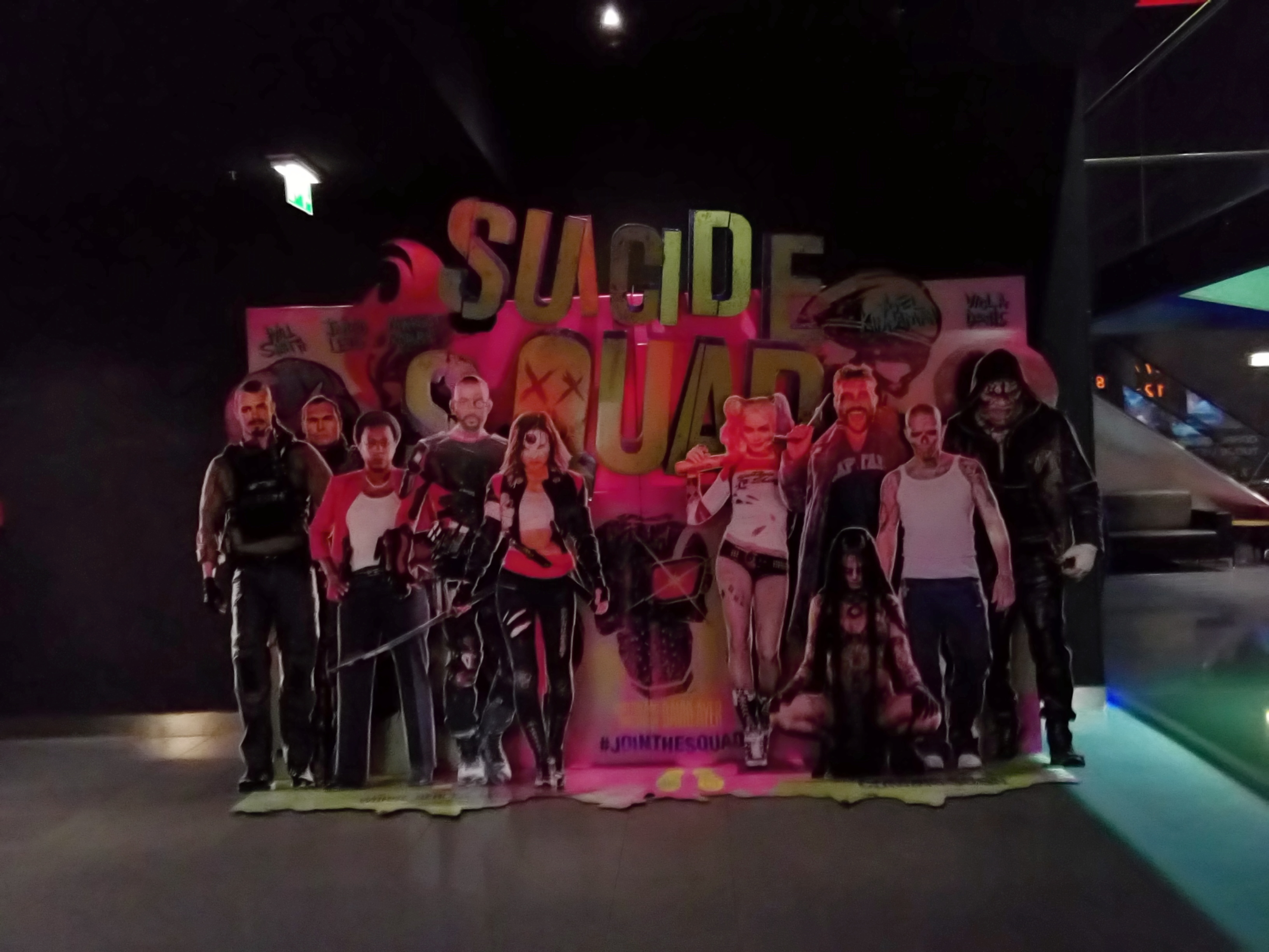 Sebevražedný oddíl v kině Imax